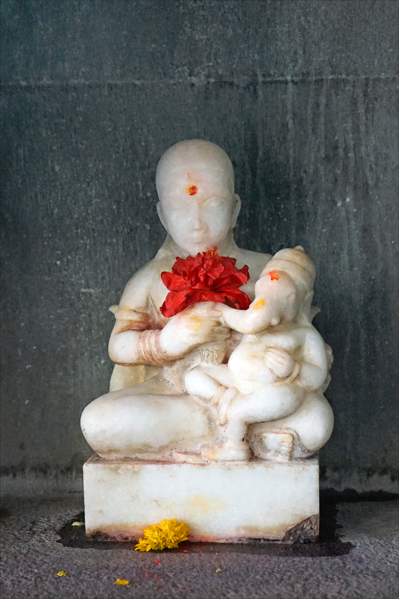 Narmada river ghat statues idols Hinduism